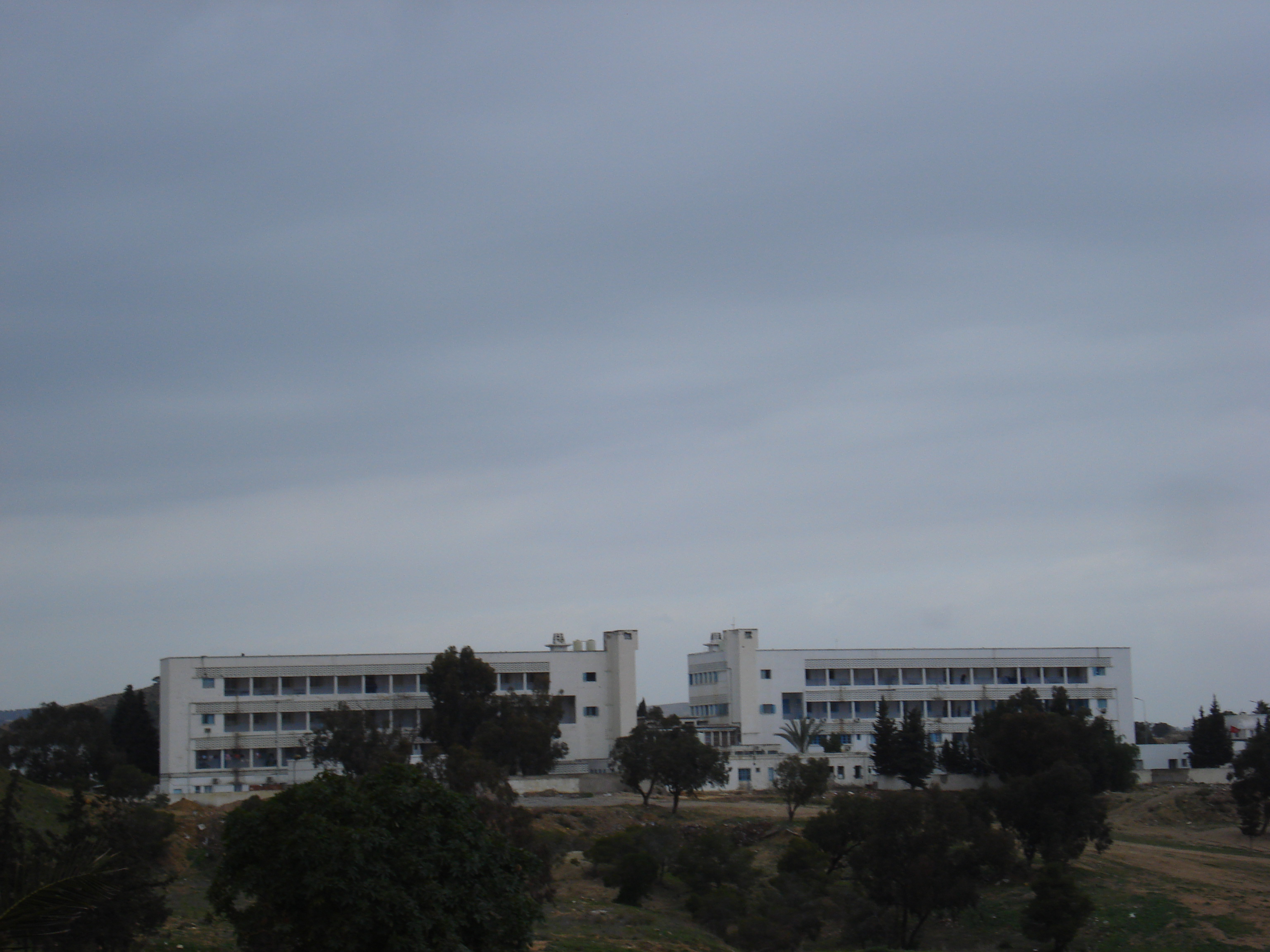 Hôpital Abderrahmen Mami de pneumo-phtisiologie, L'Ariana, Tunisie